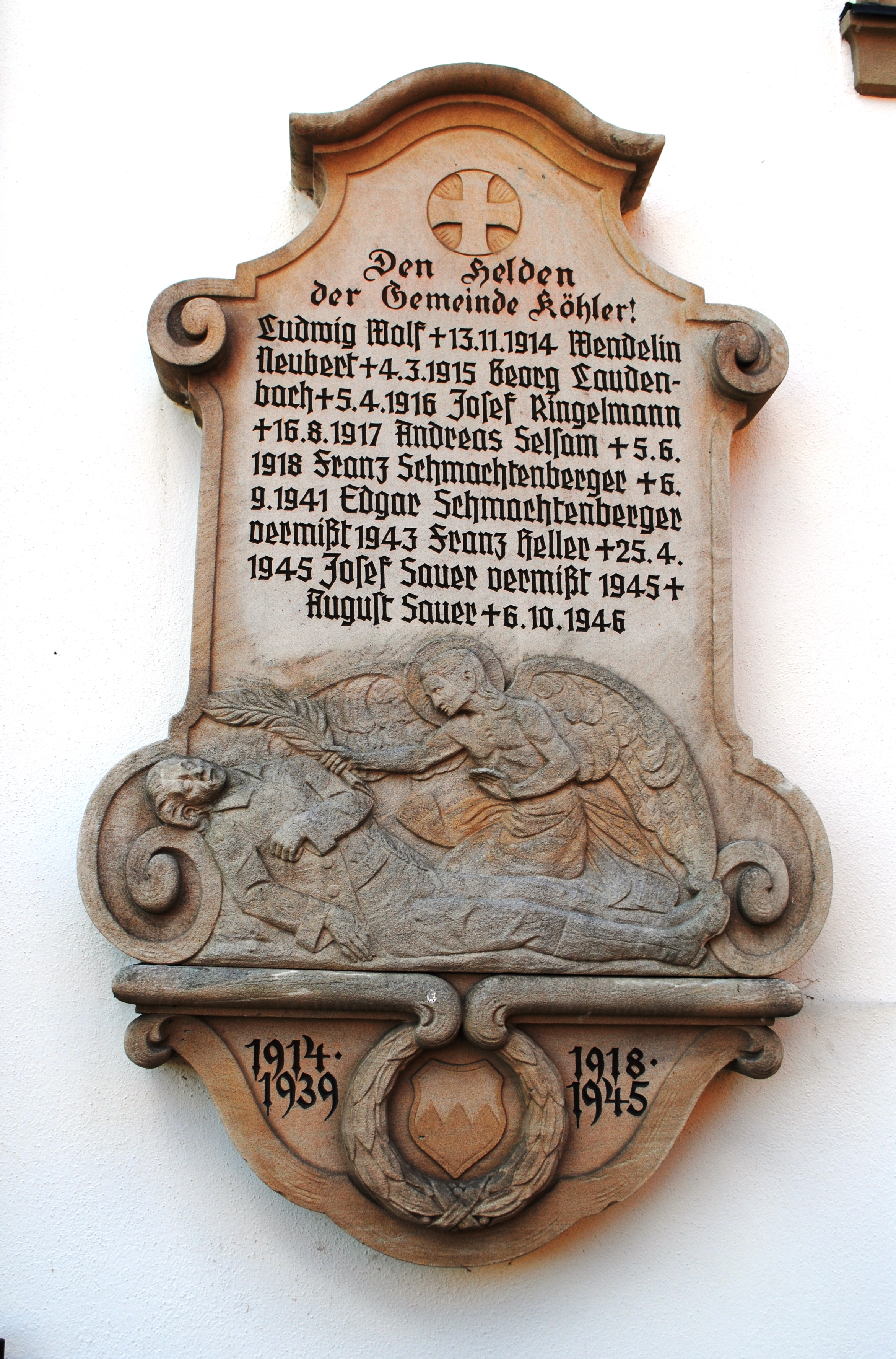 Kriegerdenkmal, Kirche Köhler, St. Andreas, außen